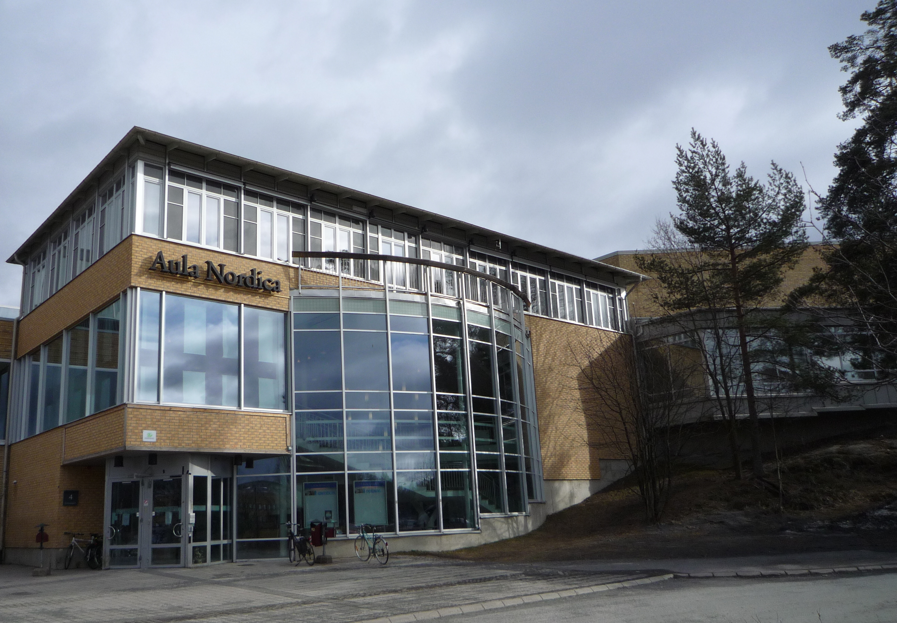 Entrén till Aula Nordica, bredvid Universum-huset på Umeå universitets campus.